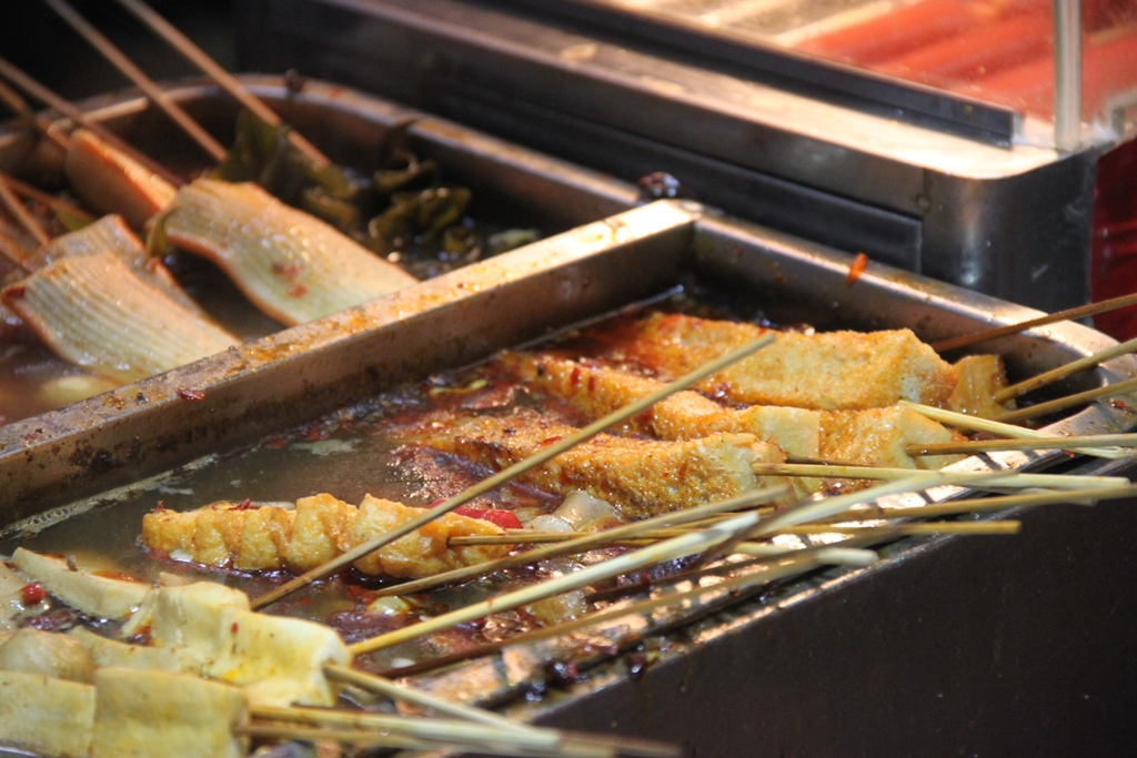 Beijing, China